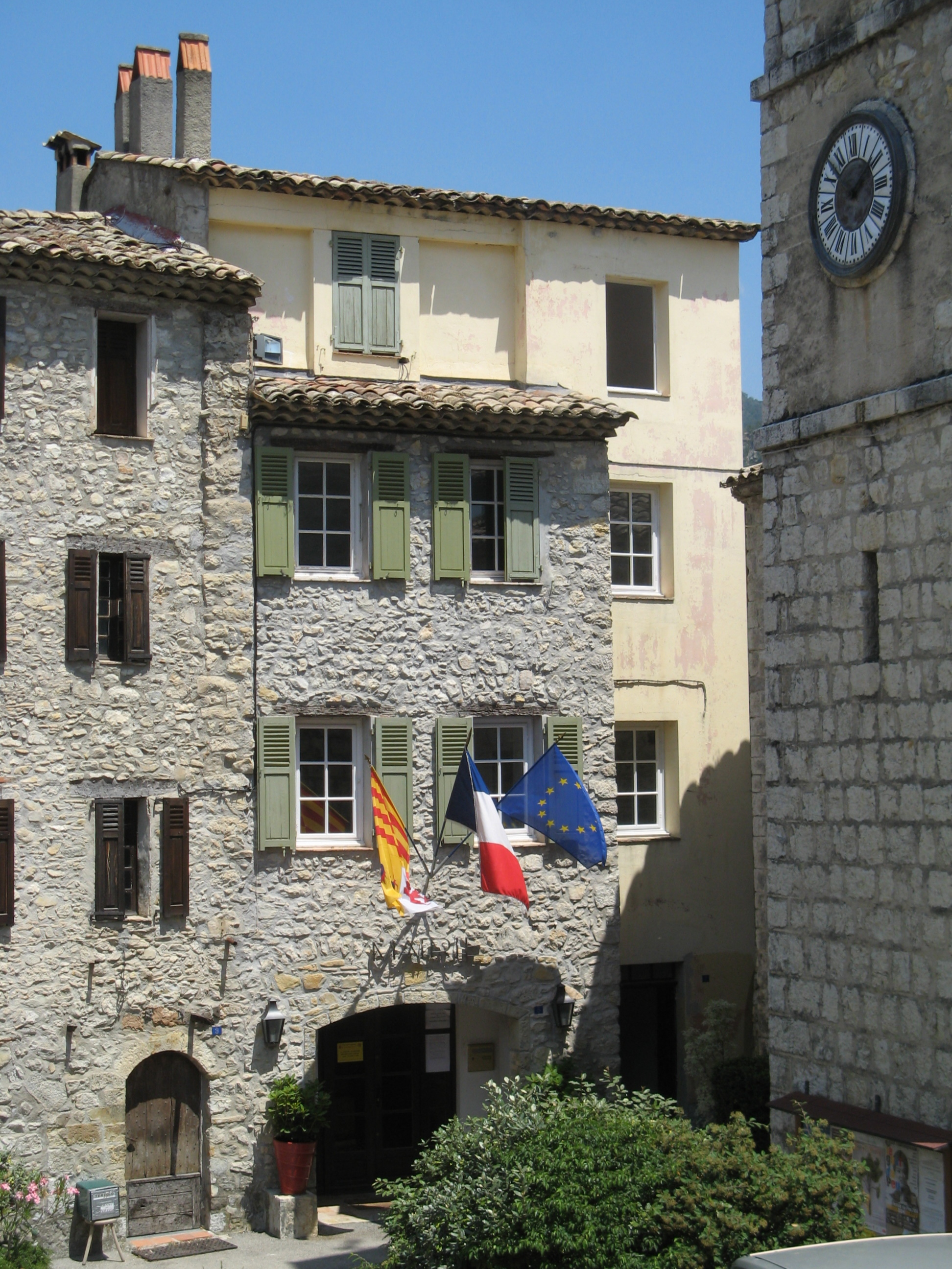 Mairie de Cuébris (Alpes-Maritimes)